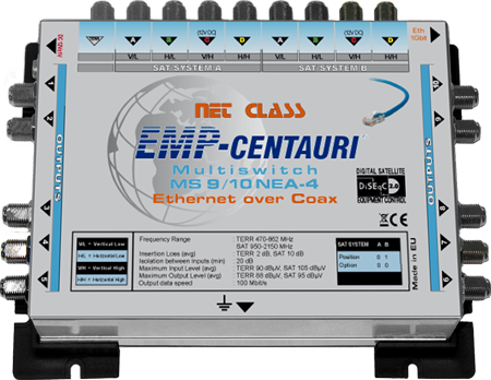 Síťový multipřepínač